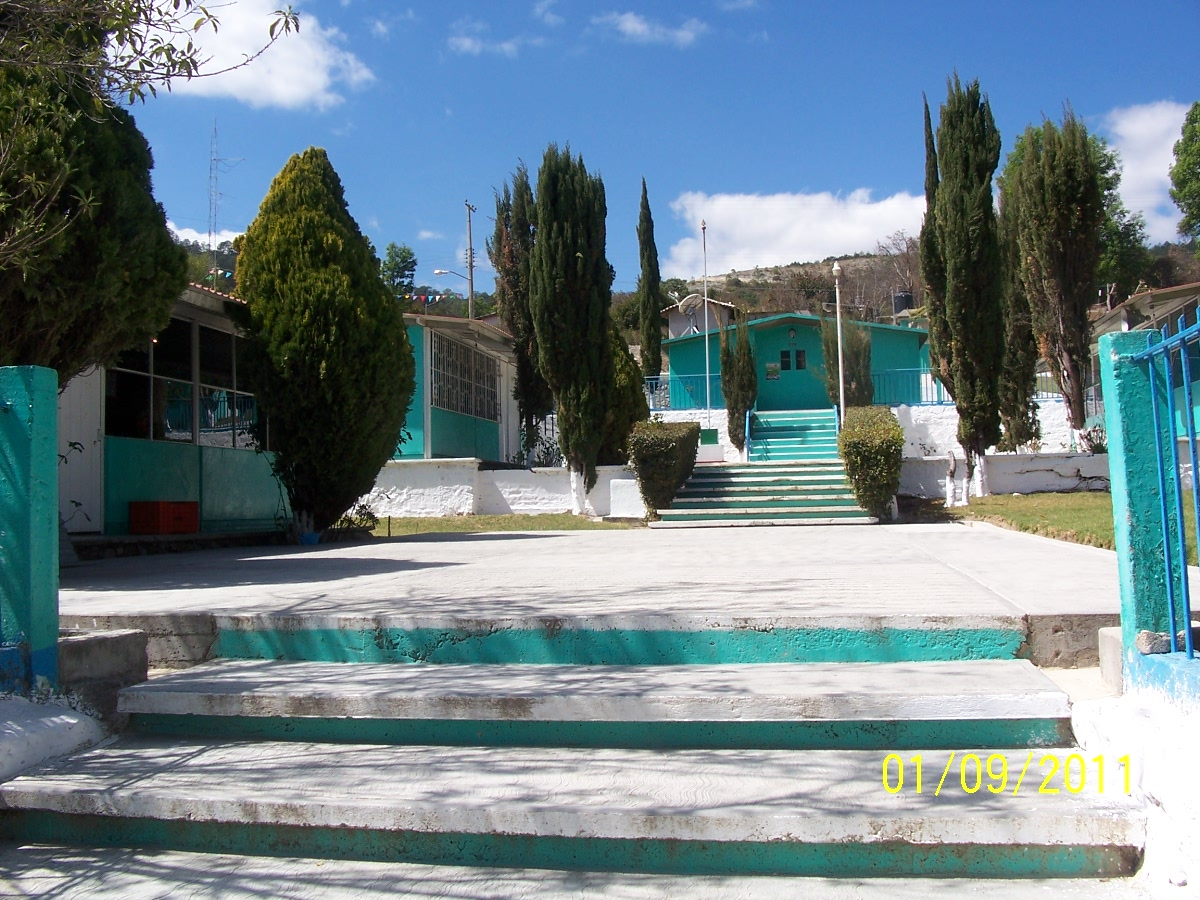 Escuela primaria de San Juan Achiutla, Oaxaca, Mëxico